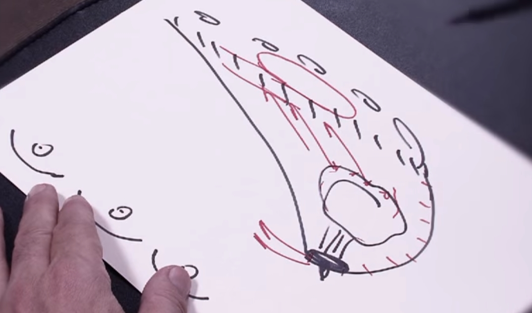 El Dr. Julio Puig realiza un dibujo explicativo a una paciente sobre el procedimiento de elevación de senos con implante mamario